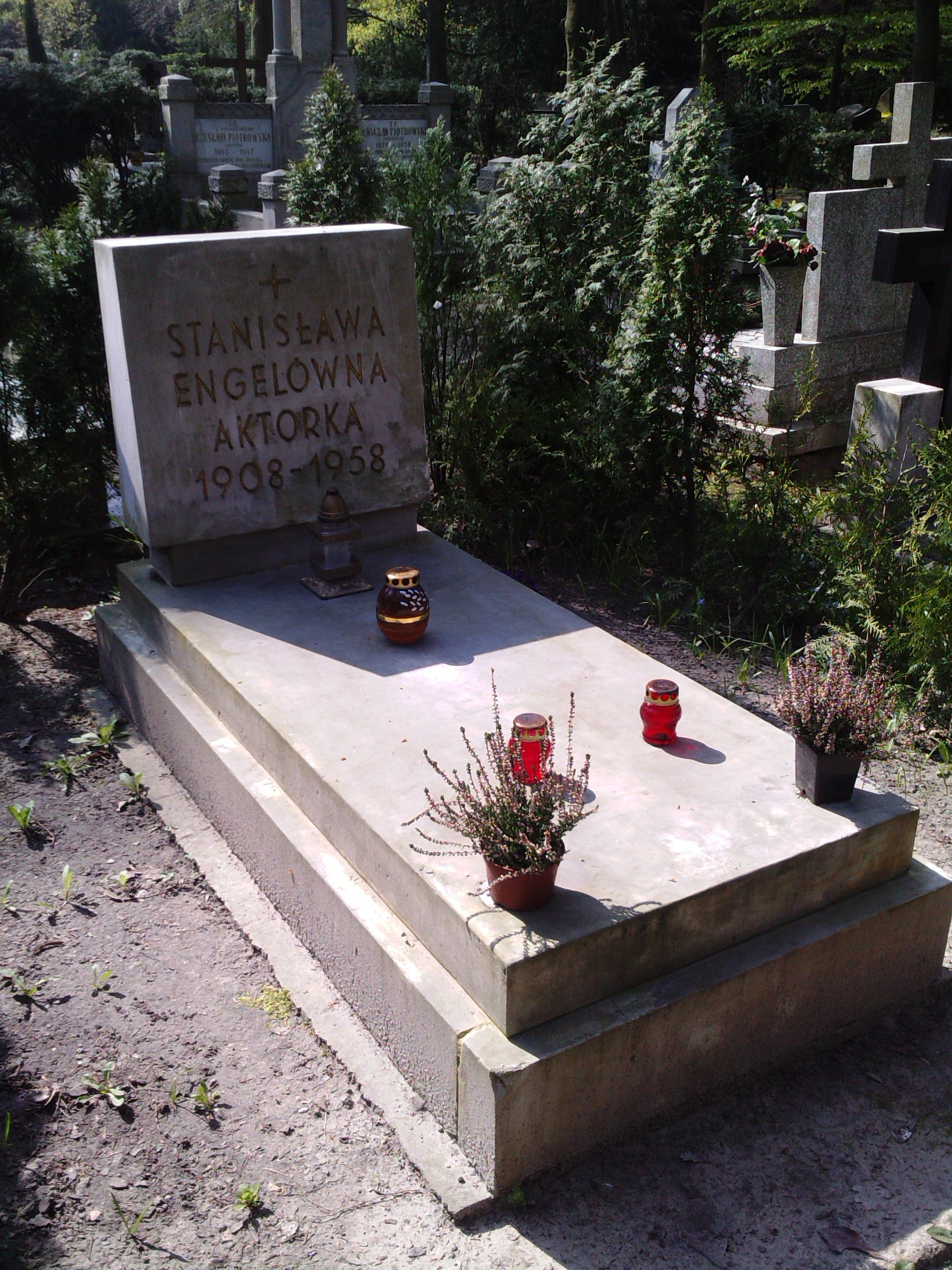 Umiejscowienie grobu Stanisławy Angel-Engelówny - Cmentarz Centralny w Szczecinie(Nr kwatery:20A, Rząd:4,Nr grobu:3)